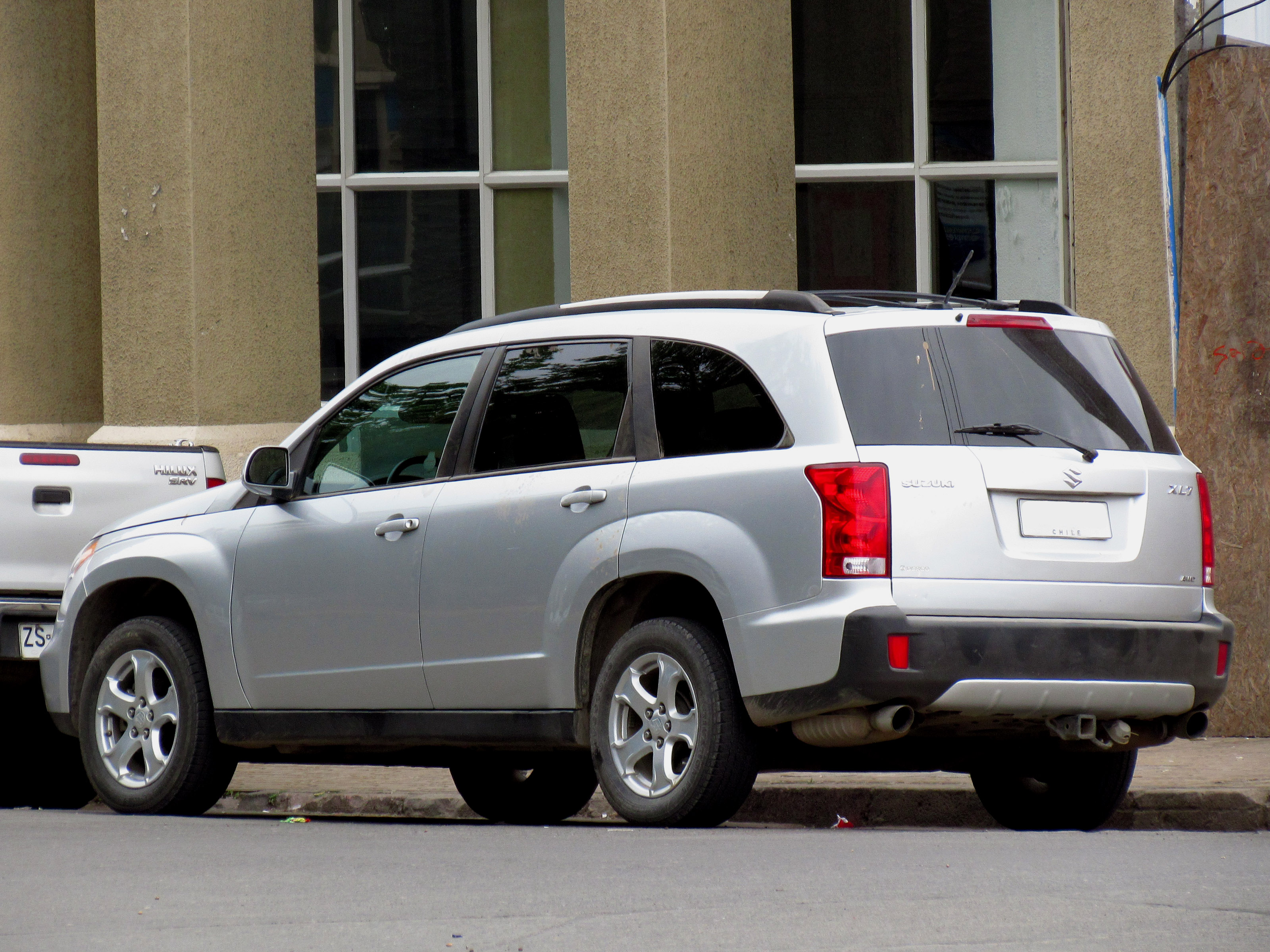 Suzuki XL7 V6 2010